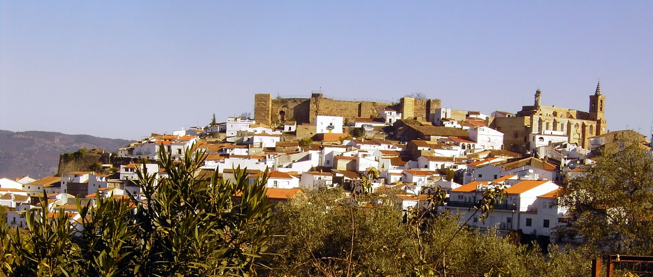 Localidad de Aroche, Huelva.